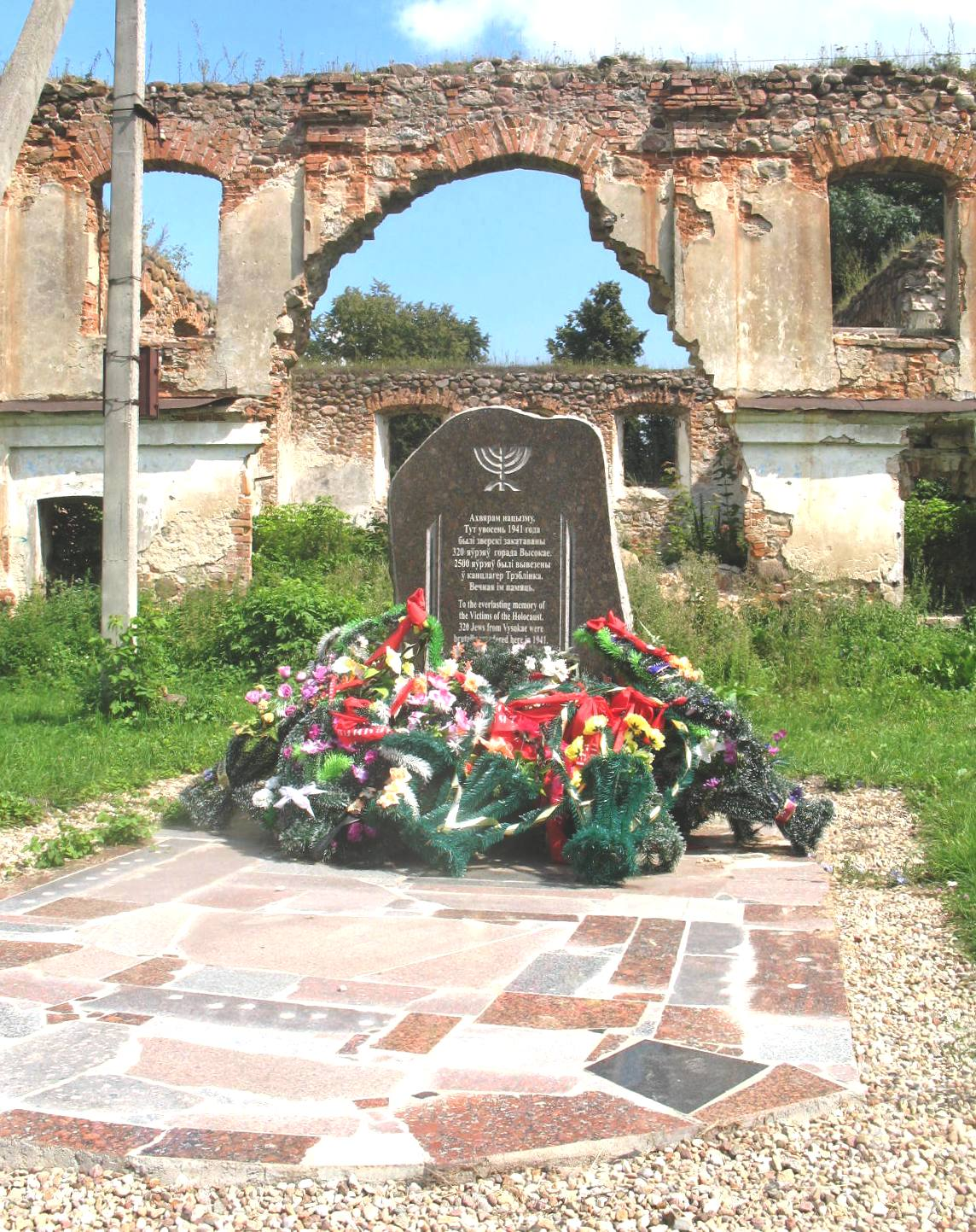 Памятник евреям - узникам гетто города Высокое Брестской области, убитым в 1942 году.